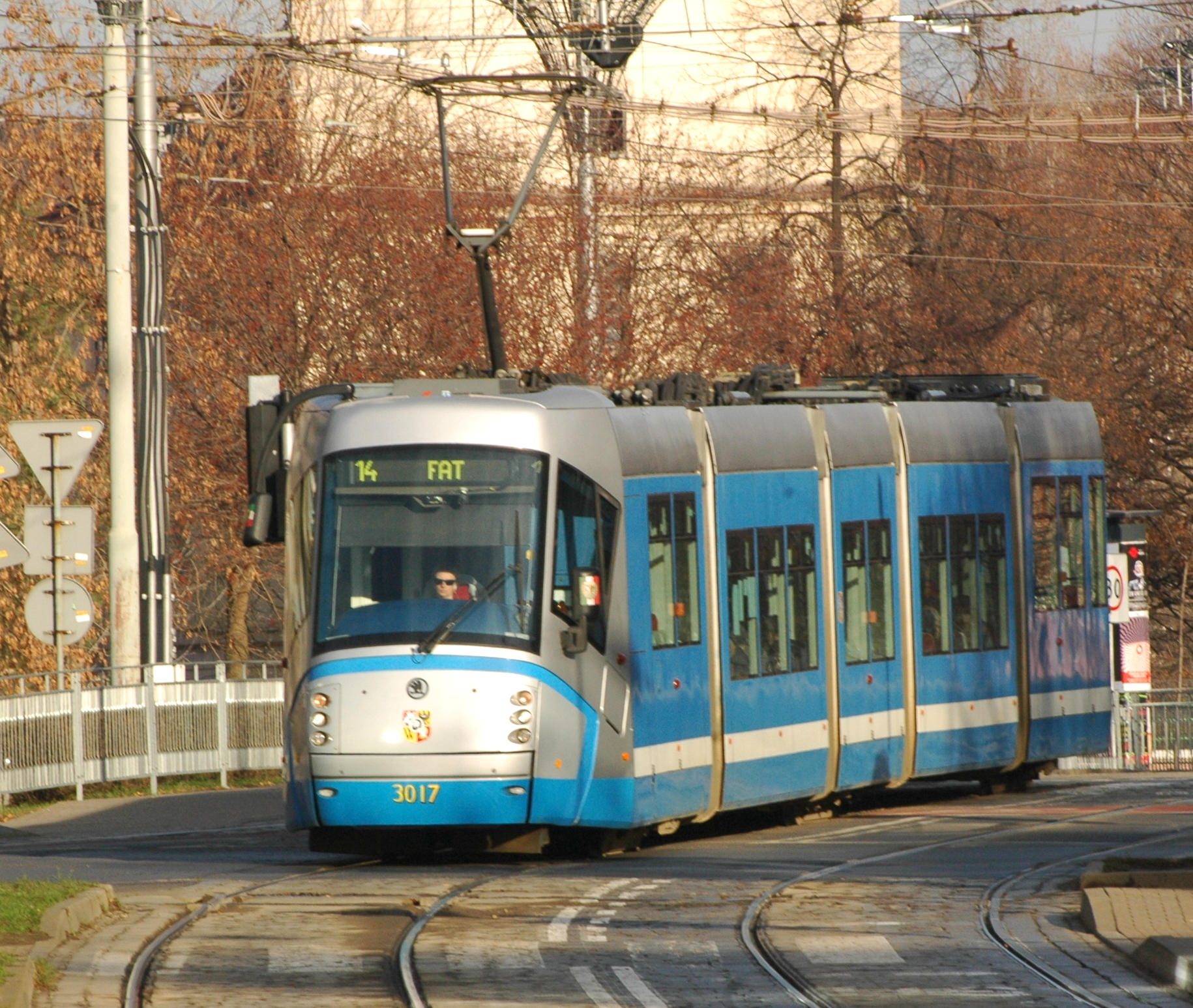 Wrocławski tramwaj (jak w opisie)